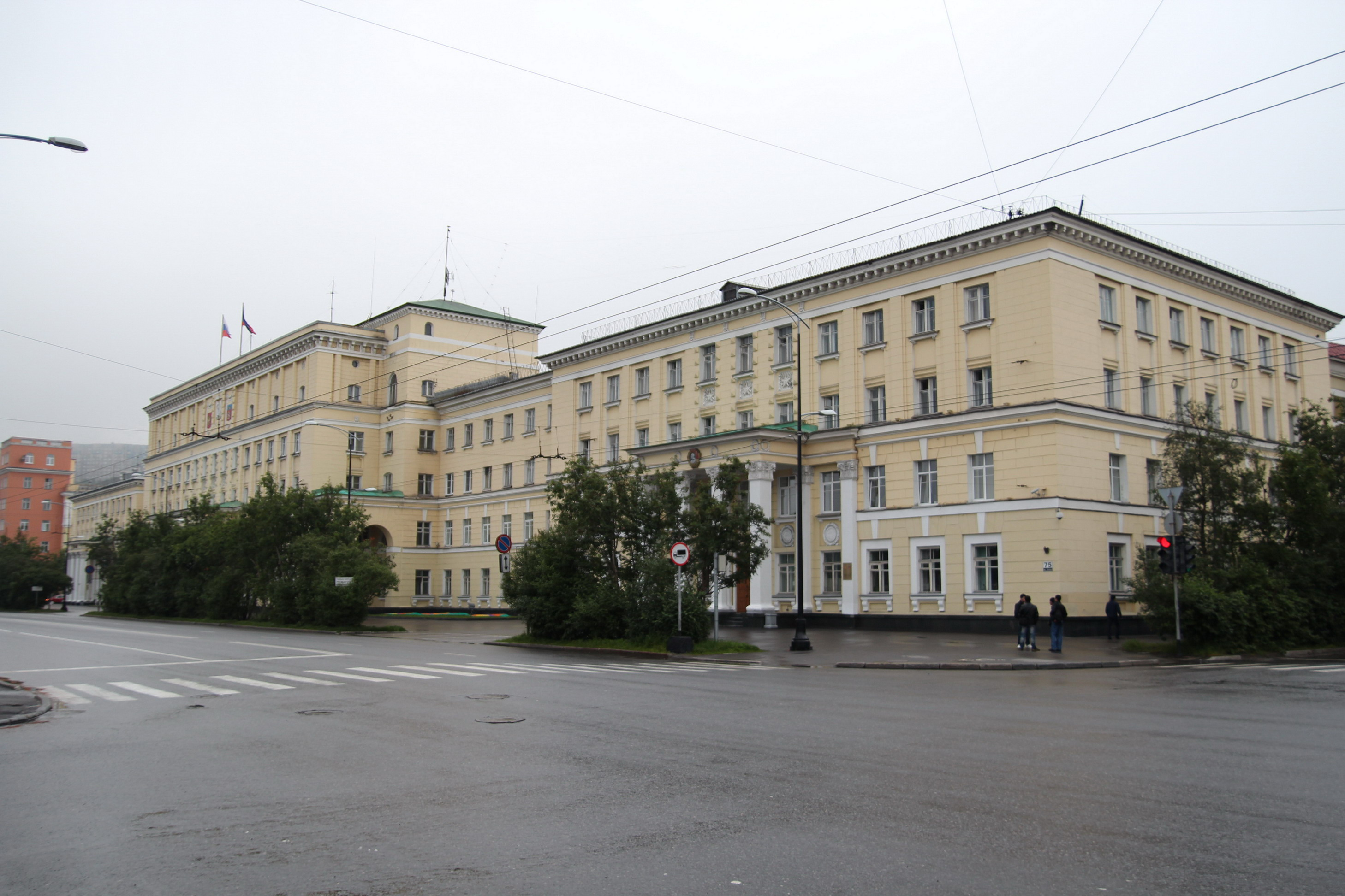 Здание администраций